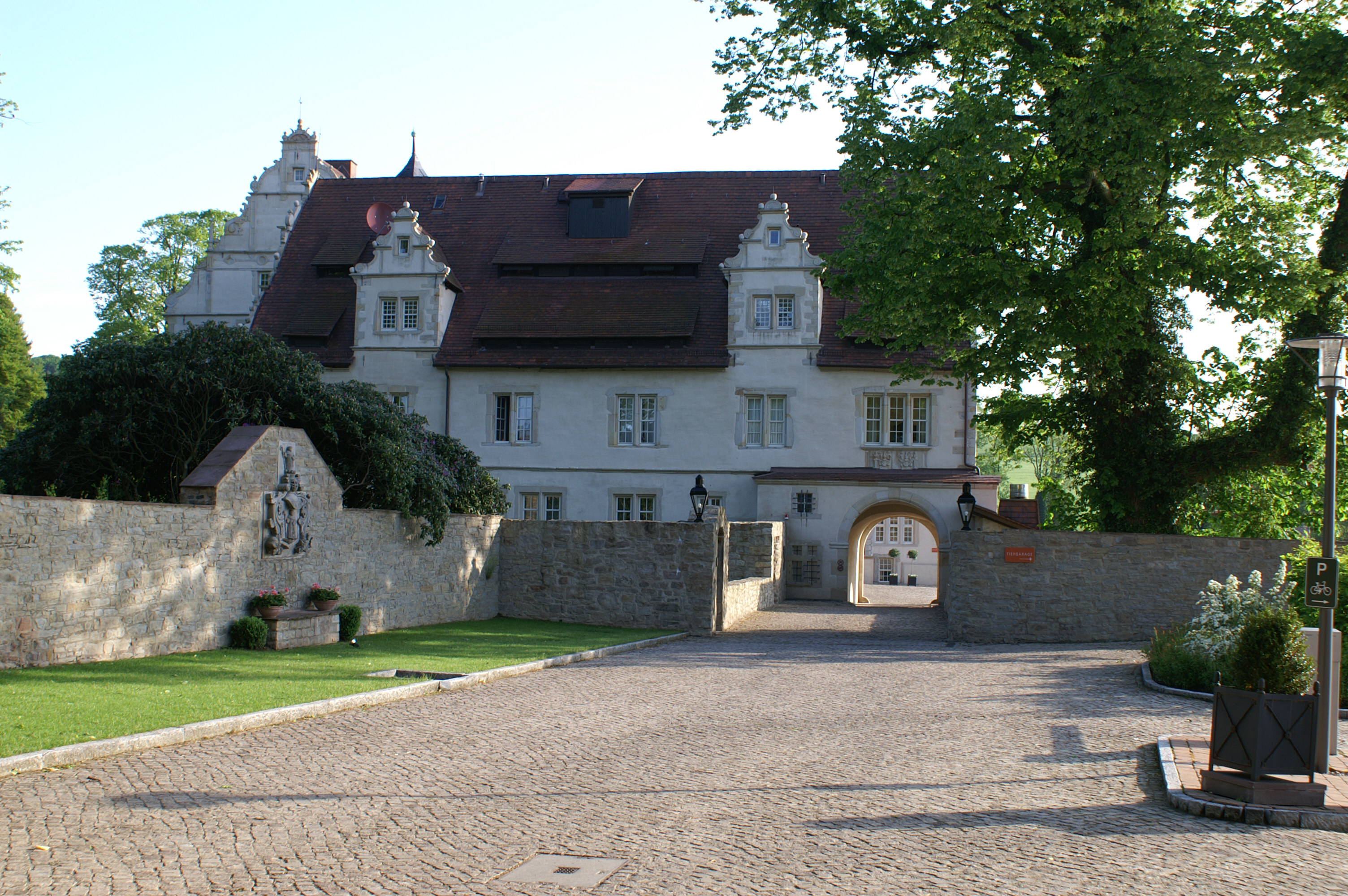 Deutschland, Niedersachsen, Gartenansicht von Schloss Schwöbber bei Aerzen in der Nähe von Hameln, ein schönes Beispiel der Weserrenaissance, 25. Mai 2006